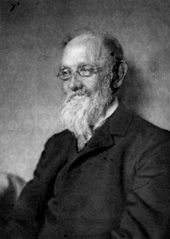 Johann Wilhelm Anton Albrecht Müller (* 13. Februar 1832 in Nürnberg; † 2. November 1909 in Jena) deutscher Anatom